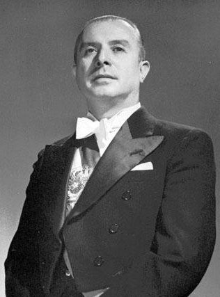 Fotografía oficial de Gabriel González Videla, Presidente de Chile (1946-1952), durante su mandato.